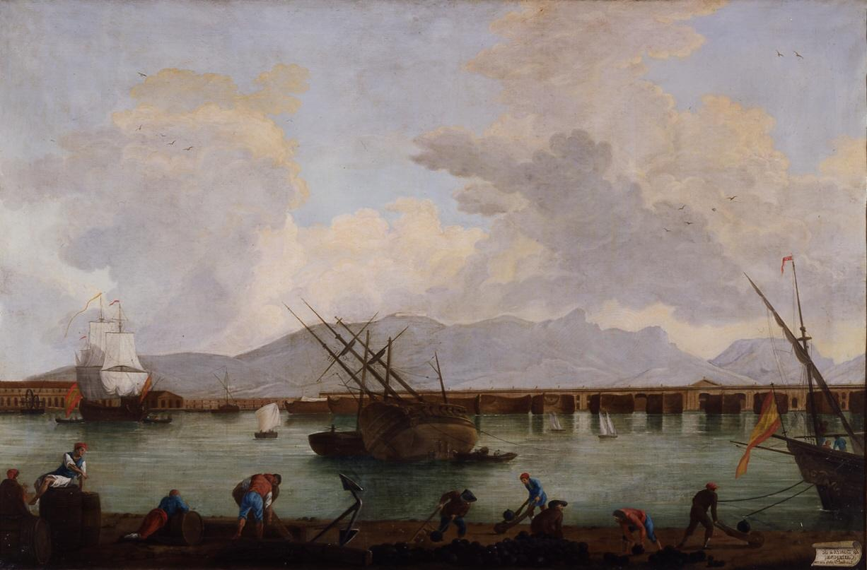 La obra representa la dársena del Puerto de Cartagena, en España.